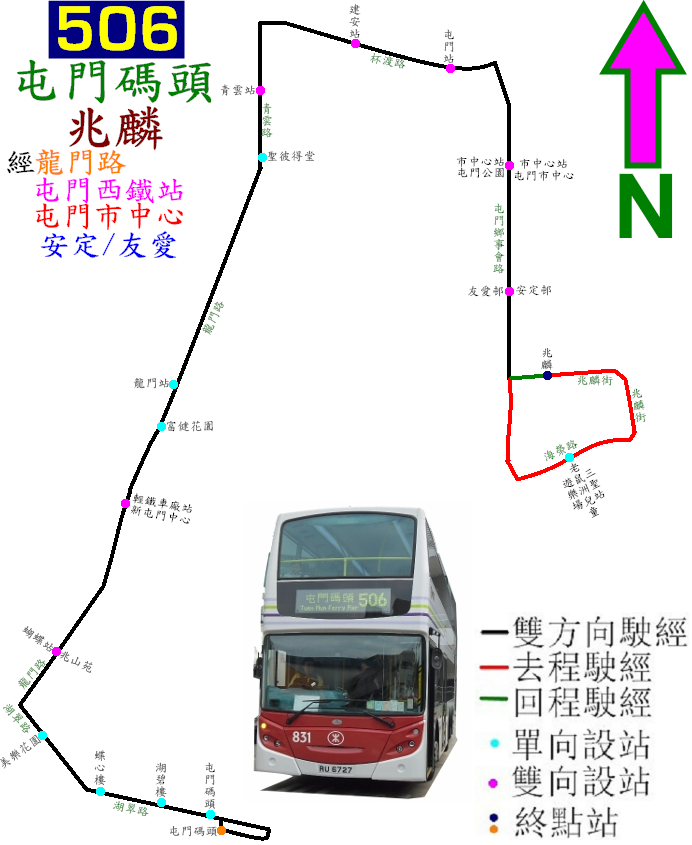 中文（香港）: 港鐵巴士506線的走線圖